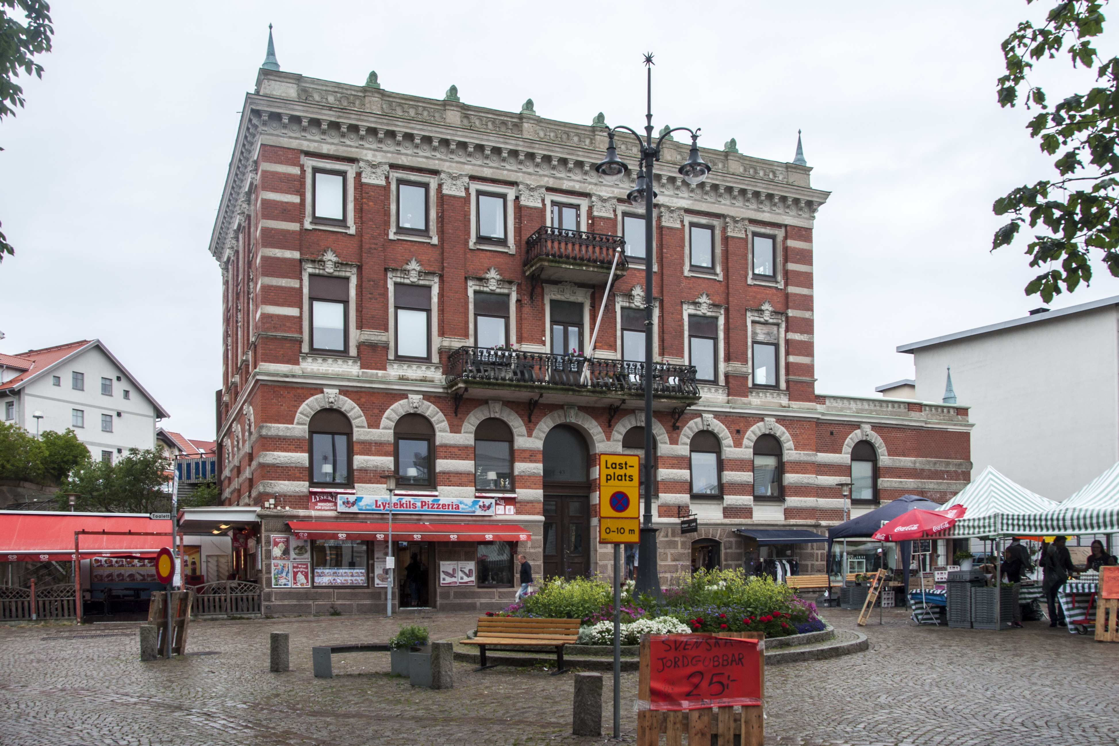 Bankhus uppfört 1892-95 av Konsul Magnus Radhe. Innehöll bostäder samt lokaler för Bohusläns enskilda bank. Lägre tillbyggnad från 1914 för Göteborgs bank 1914 enligt arkitekt Ernst Krügers ritningar.